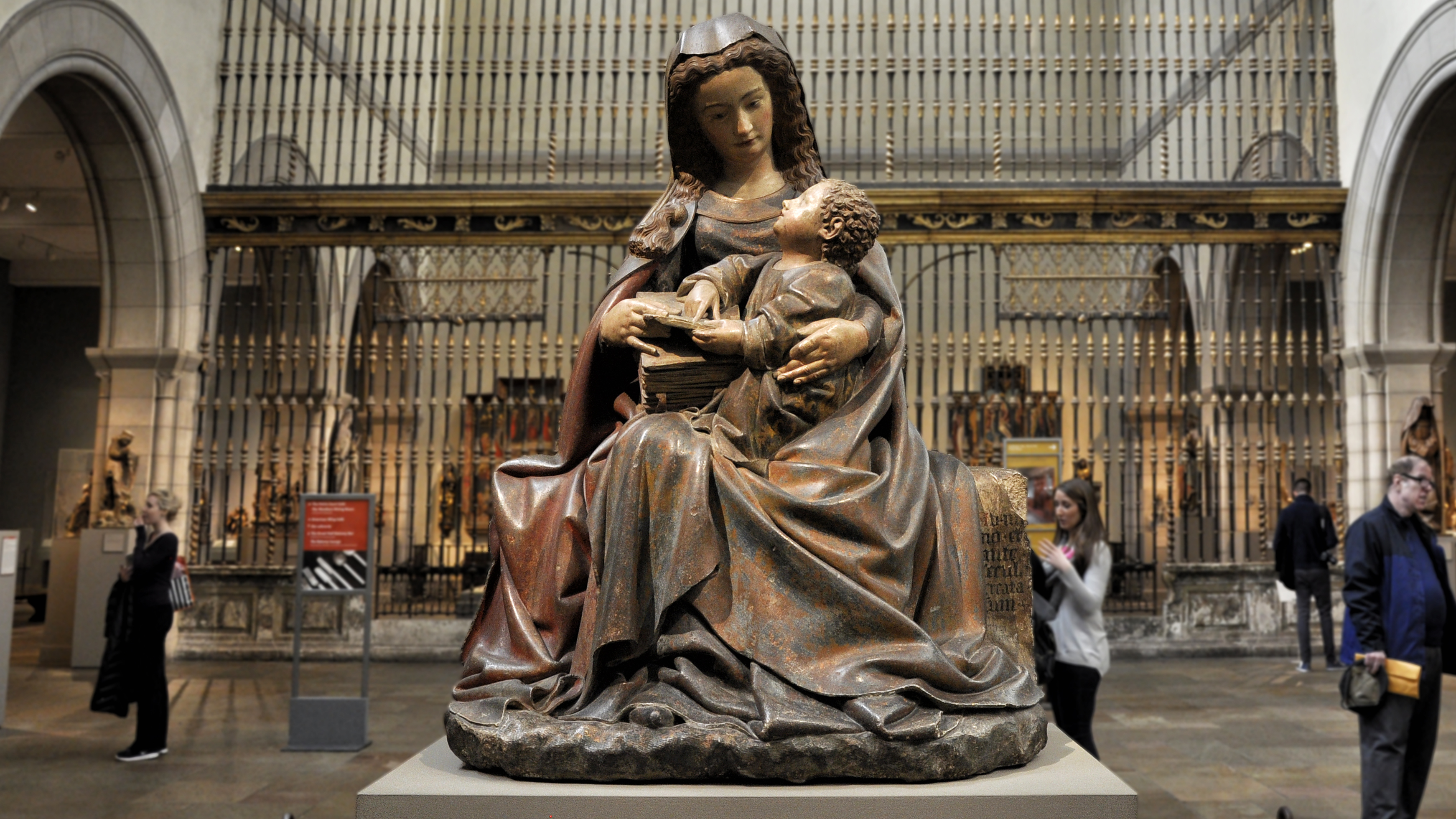 Claus van de Werve (ca.1380-1439) - Maagd en Kind - The Met New York